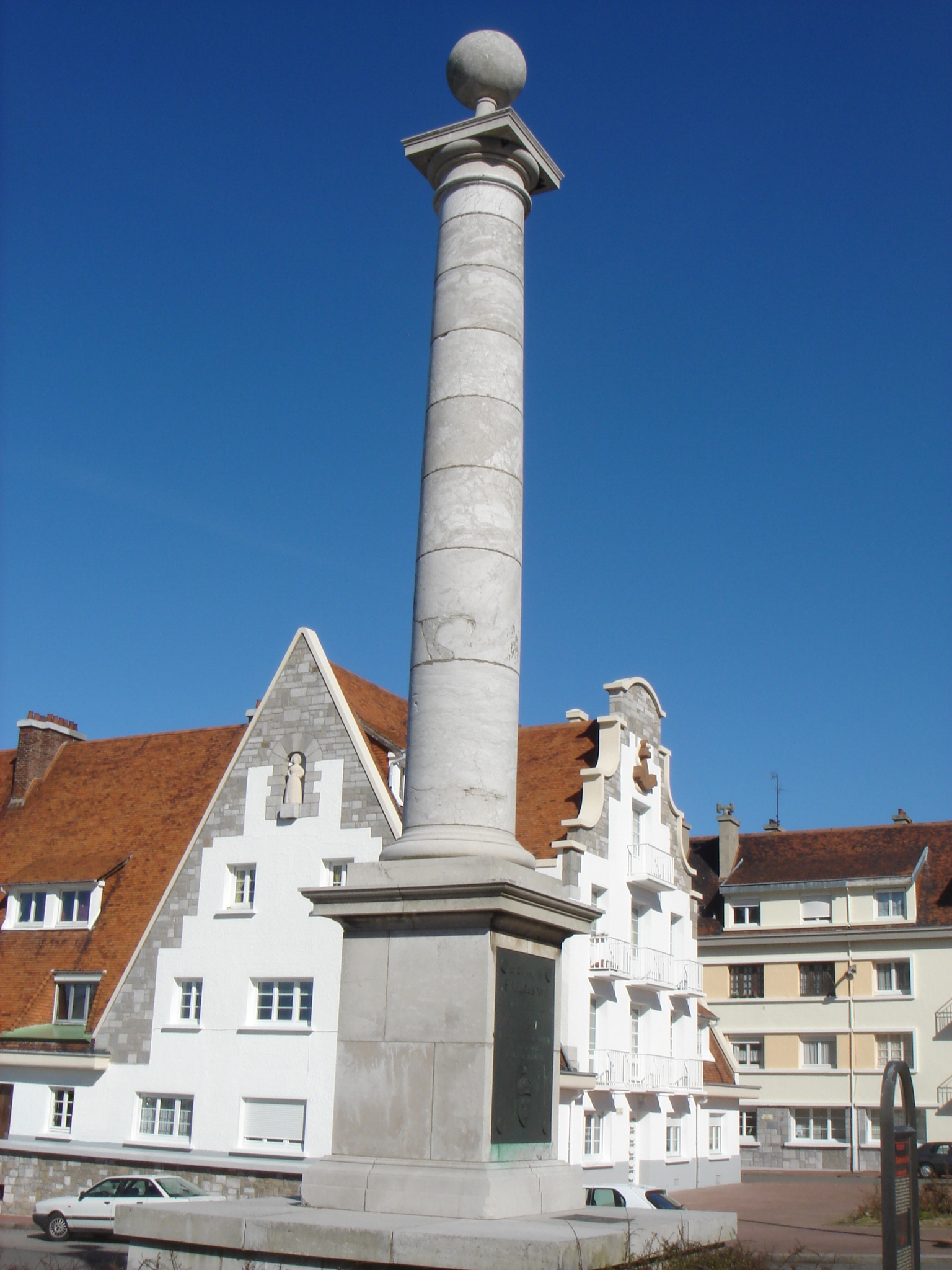 Calais Bd des Alliés Colonne Louis XVIII